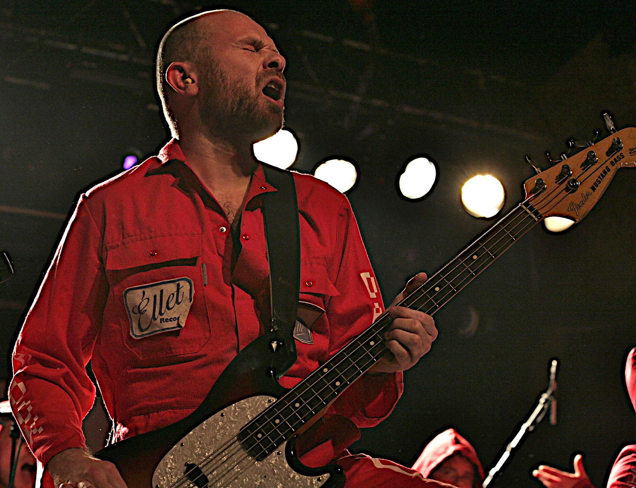 Datarock